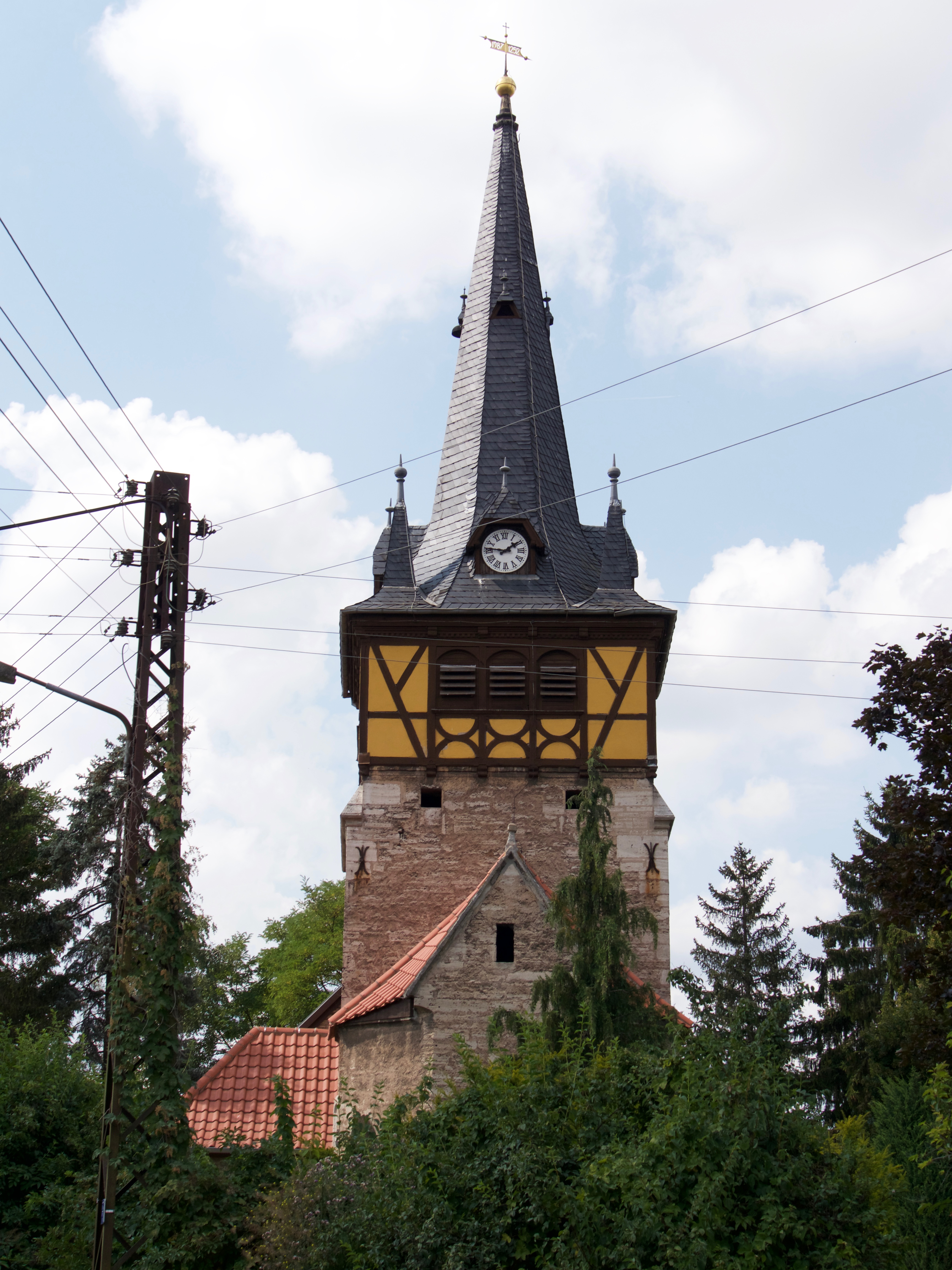 Die evangelische Dorfkirche St. Martin im Mühlhausener Ortsteil Görmar, von Osten aus gesehen.